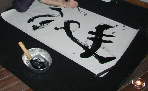 Shodo. La foto è stata scattata il 9 maggio 2002